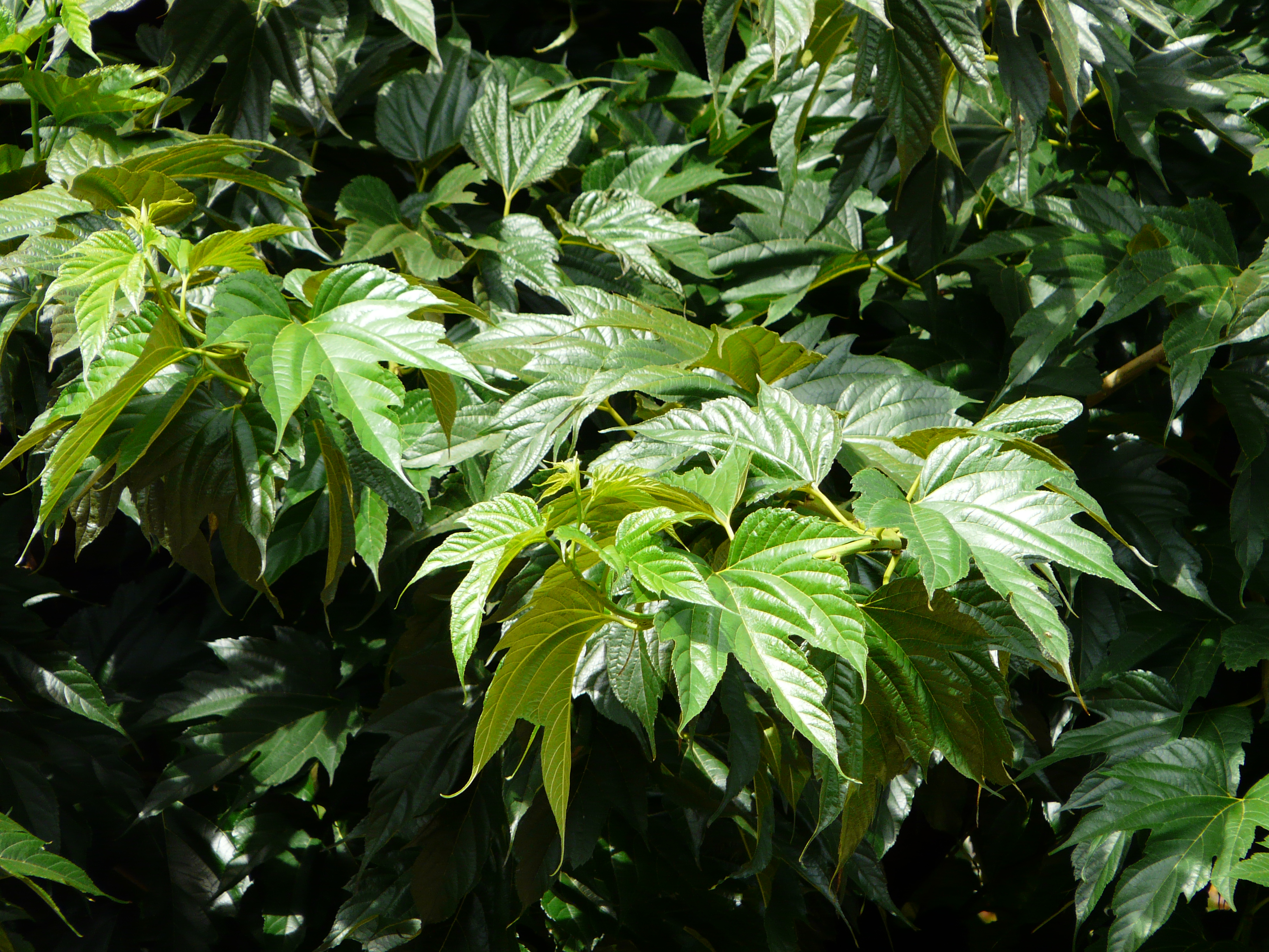 Feuilles de mûrier à feuilles de platane (Morus bombycis), parc de Piquecailloux, Bergerac, Dordogne, France.